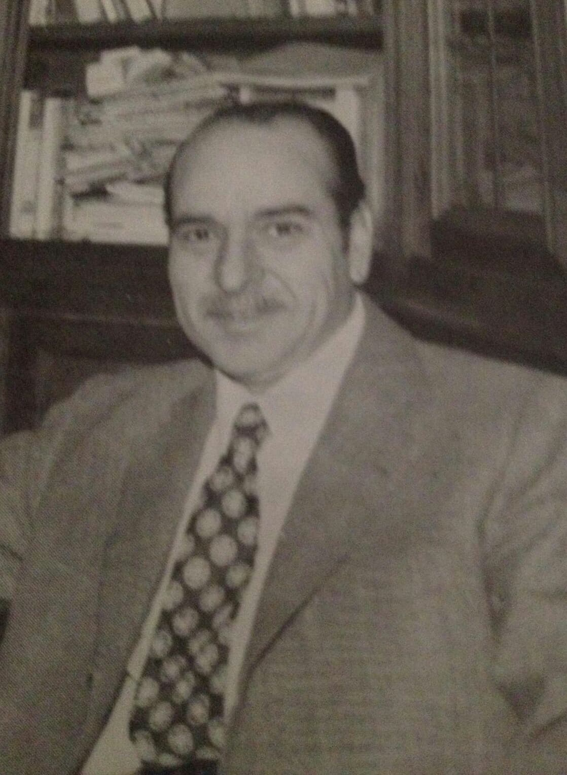 Raffaello Franchini nel suo studio